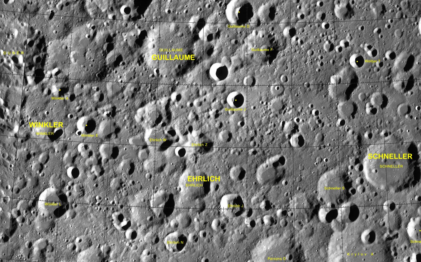 Cráter lunar Ehrlich. Localización. (Imagen LRO)